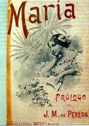 Couverture du roman María de Jorge Isaacs édité en 1899 par les Éditions Mateu. Prologue de José María de Pereda.